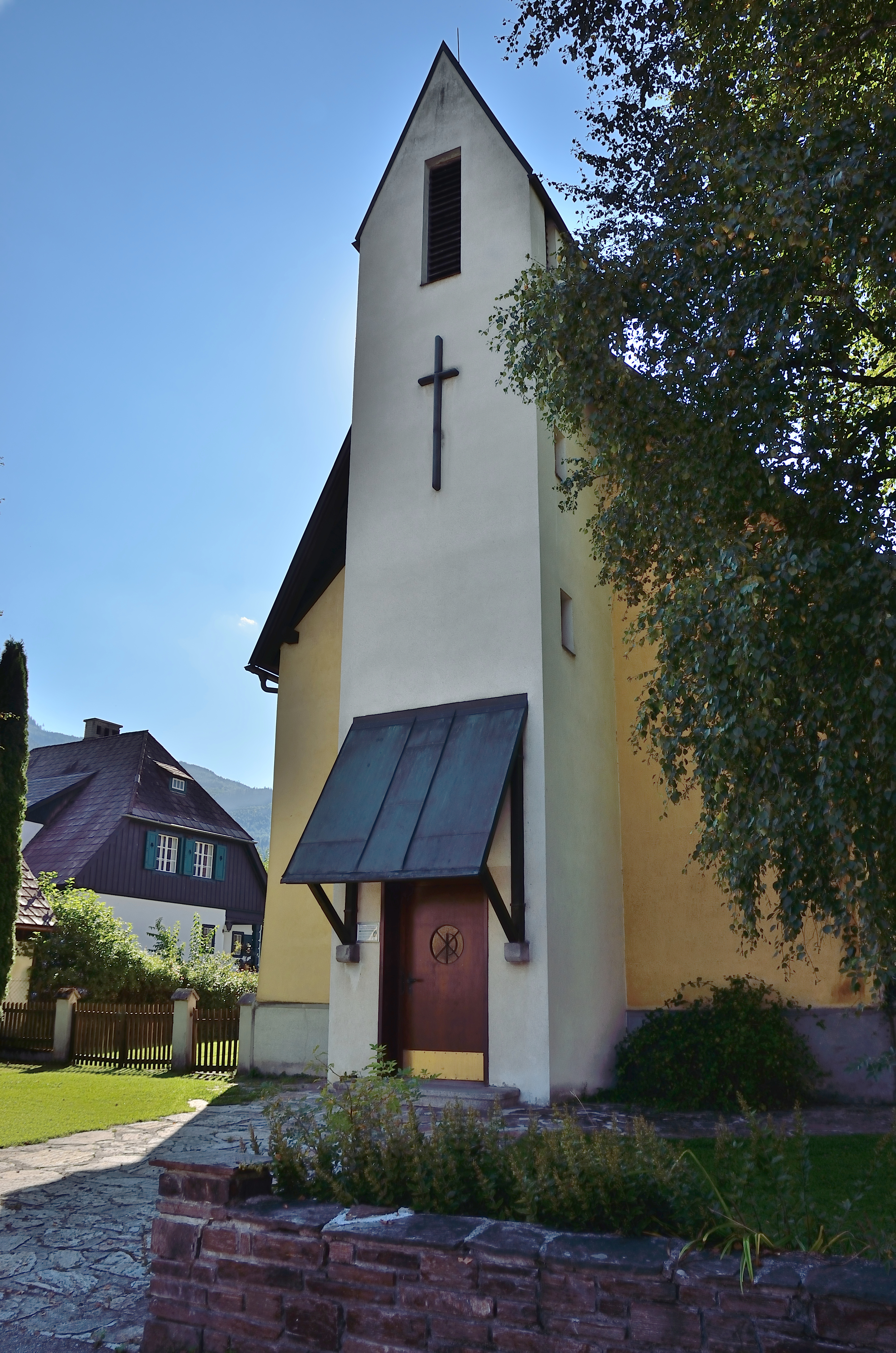 Evang. Pfarrkirche A.B. Admont, Steiermark. Ostseite.